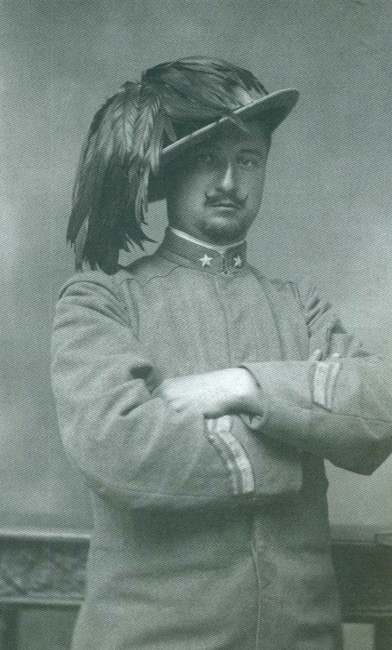 Pier Amato Perratta (1885-1944), magistrato e partigiano italiano, ritratto in uniforme negli anni 1915-18.